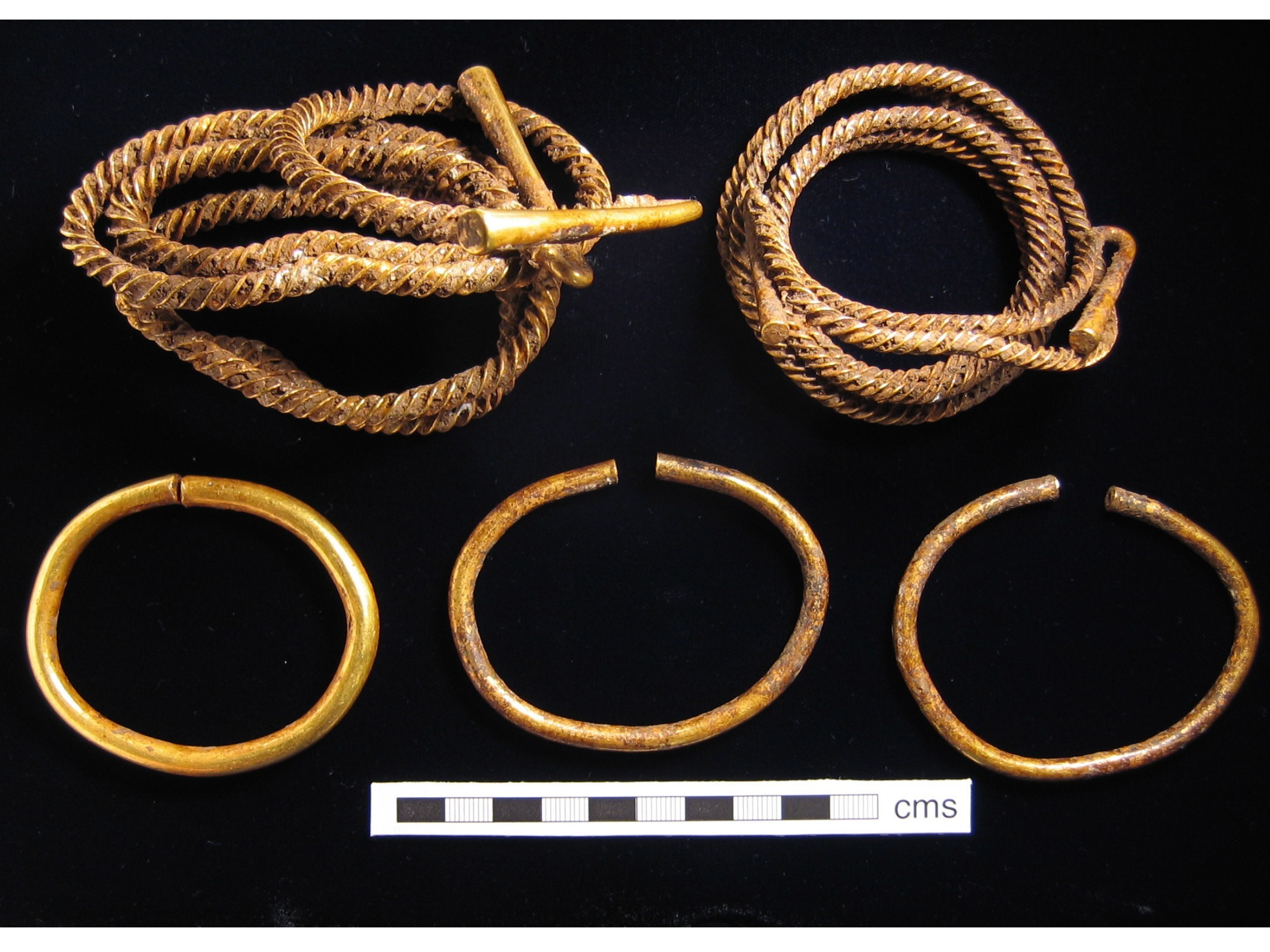 Lambourne Hoard